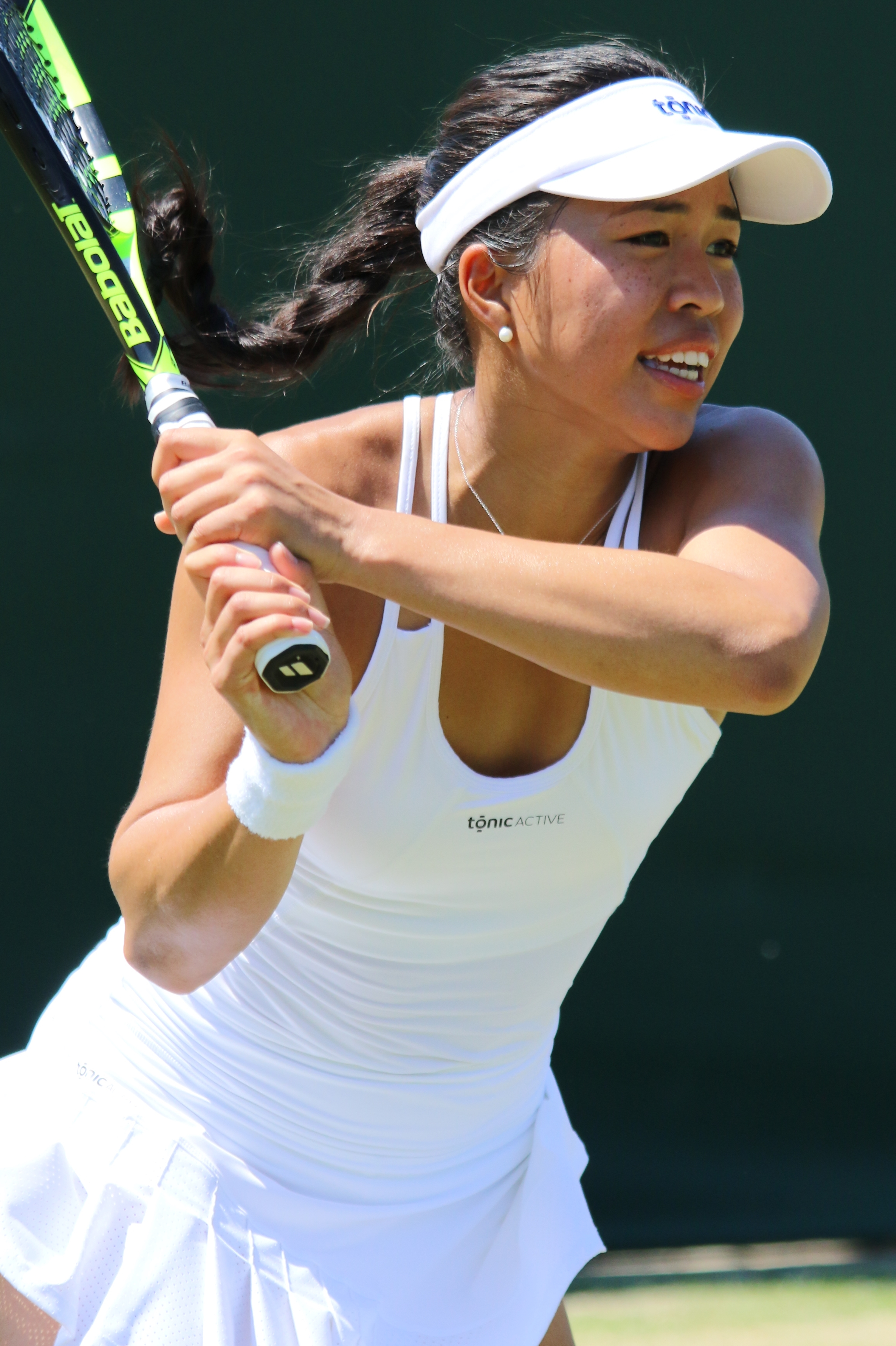 Cabrera WMQ18 (36)